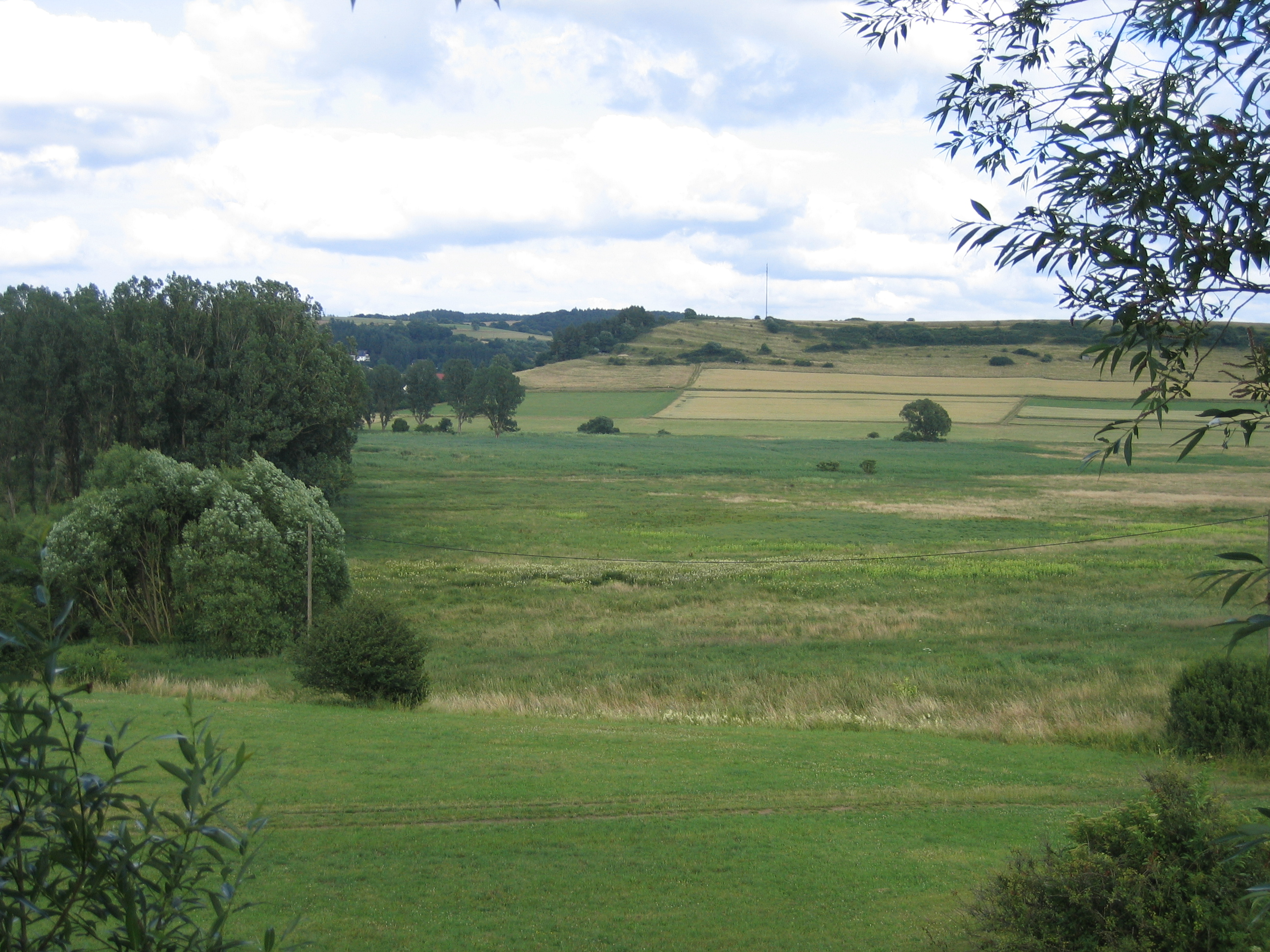 Der Dreiser Weiher in der Vulkaneifel